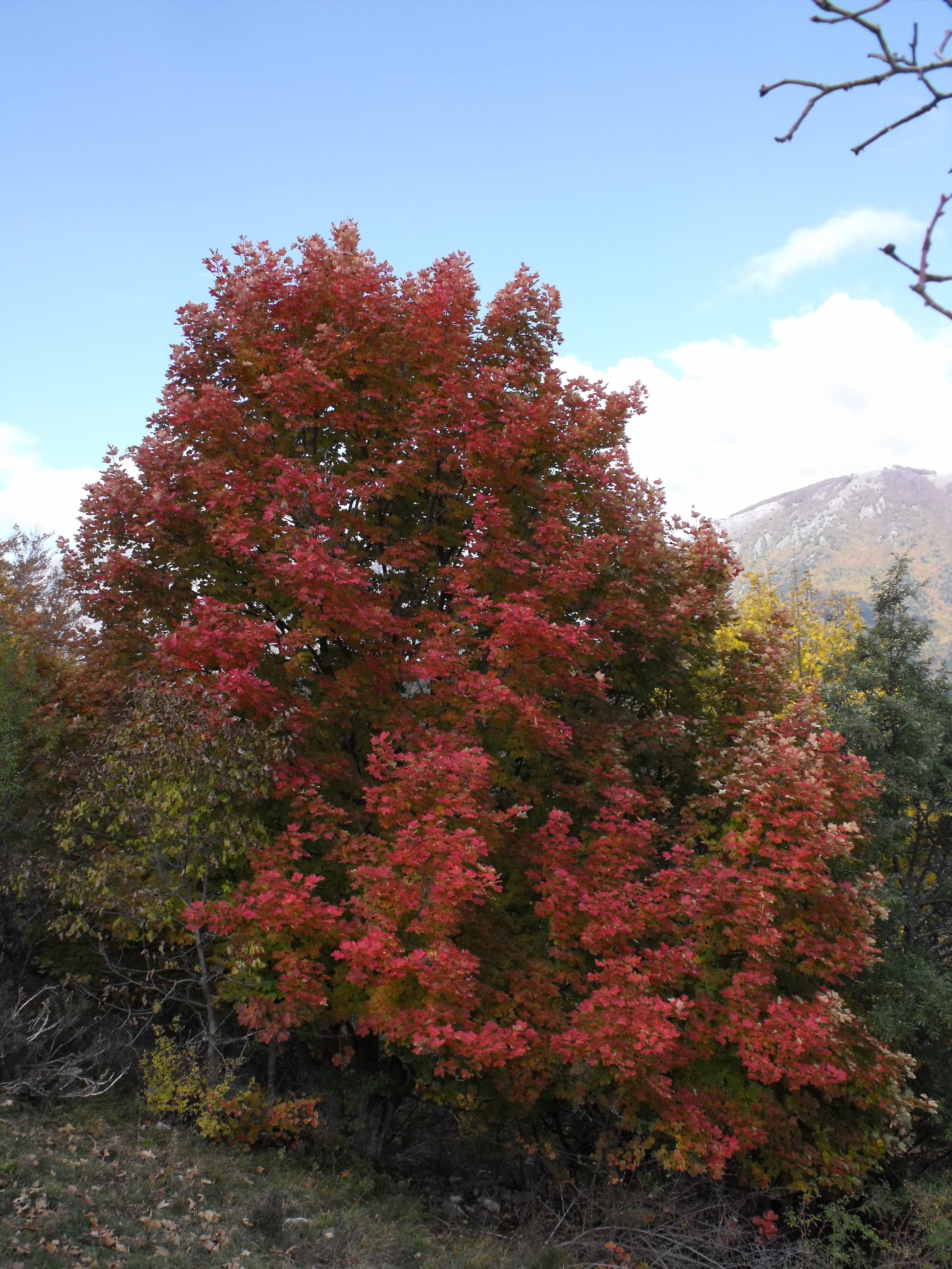 Acer opalus photographed in Camosciara (Parco nazionale d'Abruzzo, Central Italy). About 1300 m above sea level. Photo by Massimiliano Marcelli.